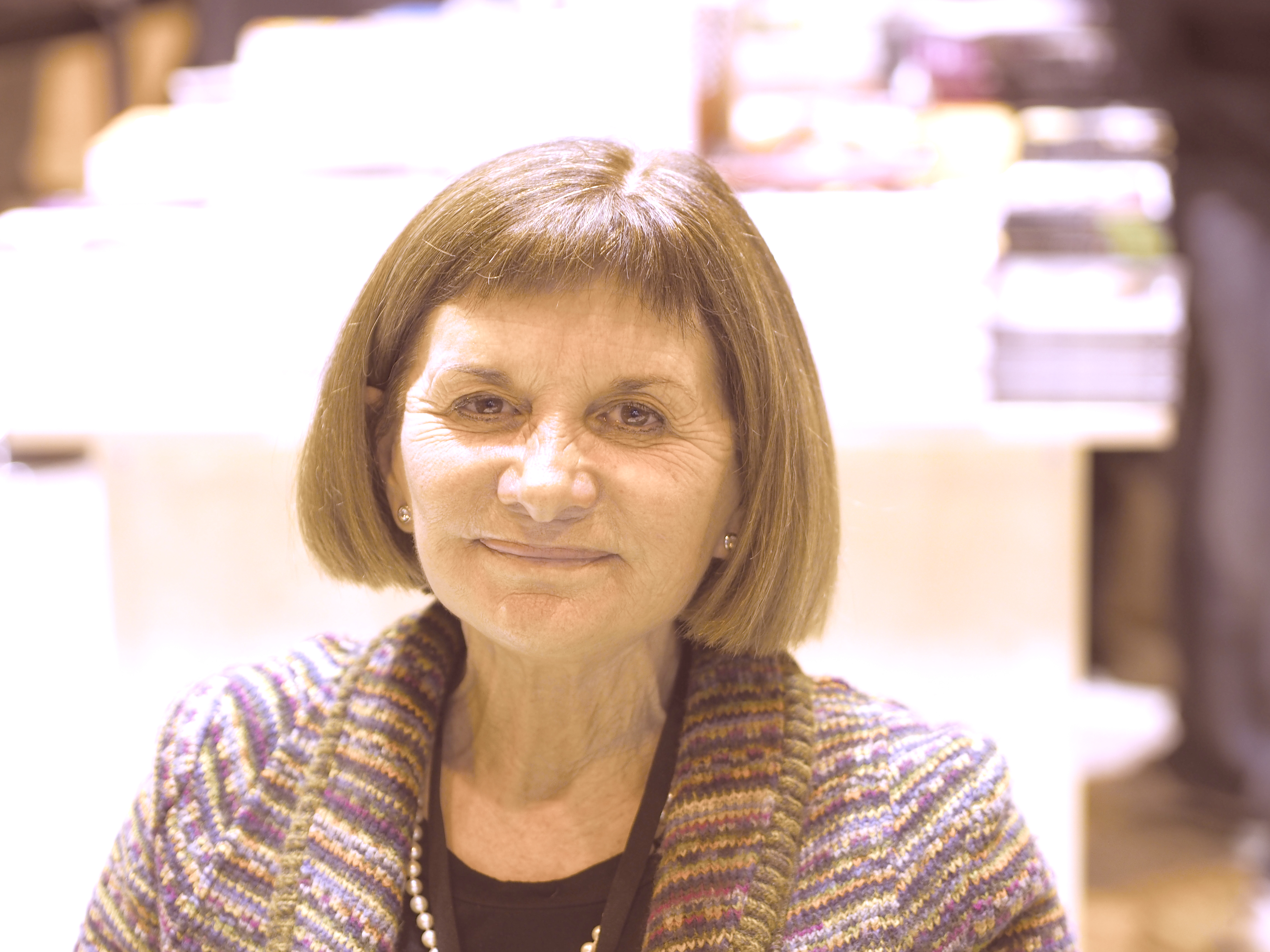 L'écrivaine espagnole Alicia Giménez-Bartlett au Salon du livre de Paris le 24 mars 2013.